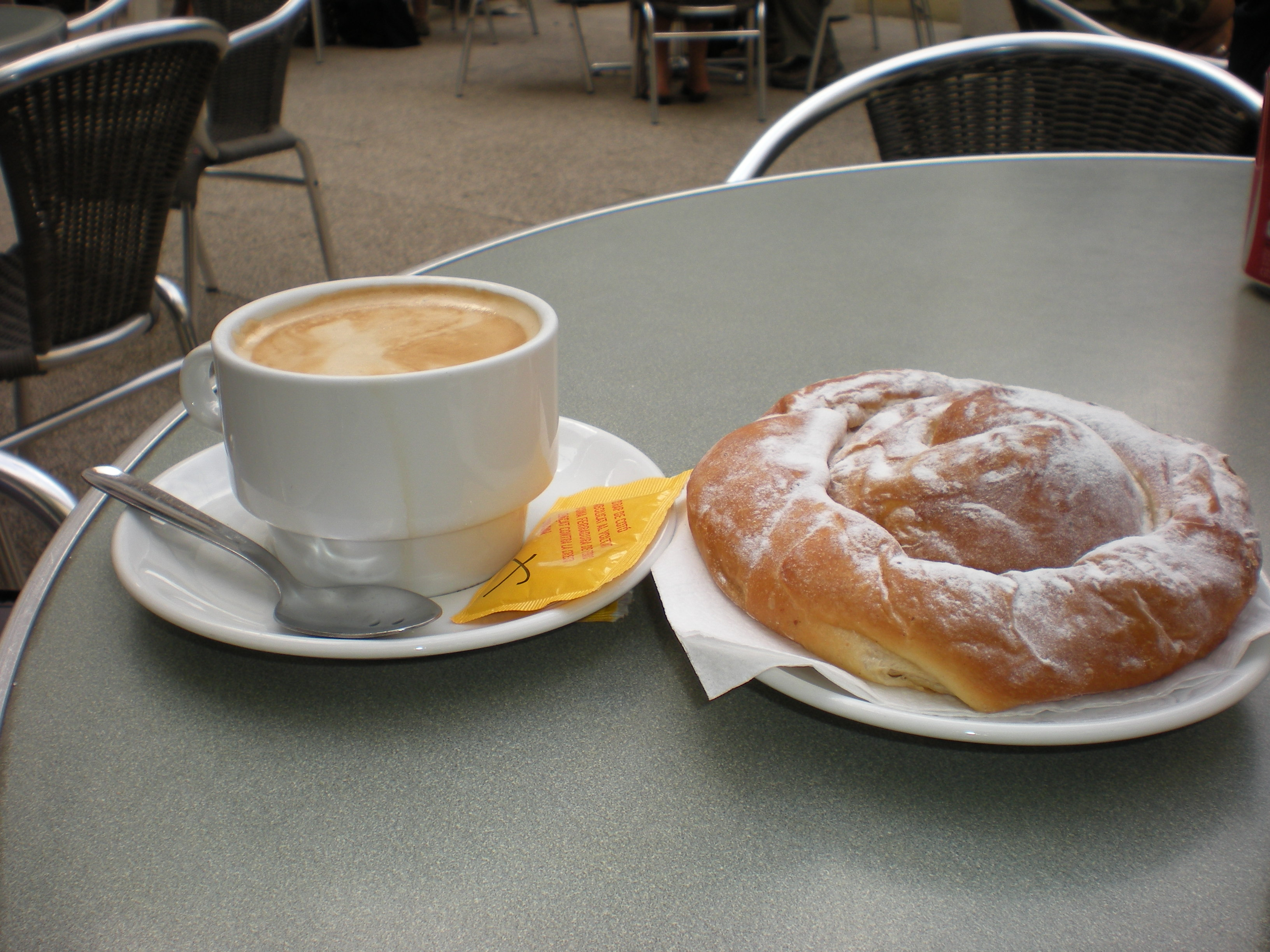 Un café con leche y una ensaimada, en un bar de Barcelona.